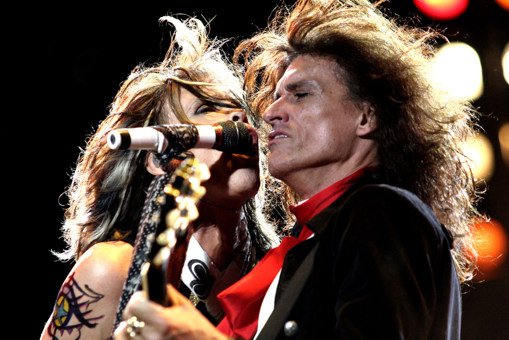 Aerosmith - Steven_TylerSteven_Tyler, Joe Perry